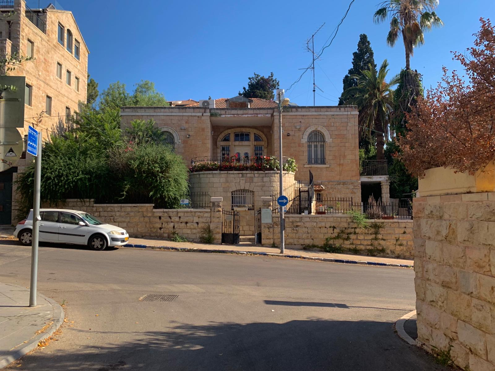 بيوت من حيّ الطالبية